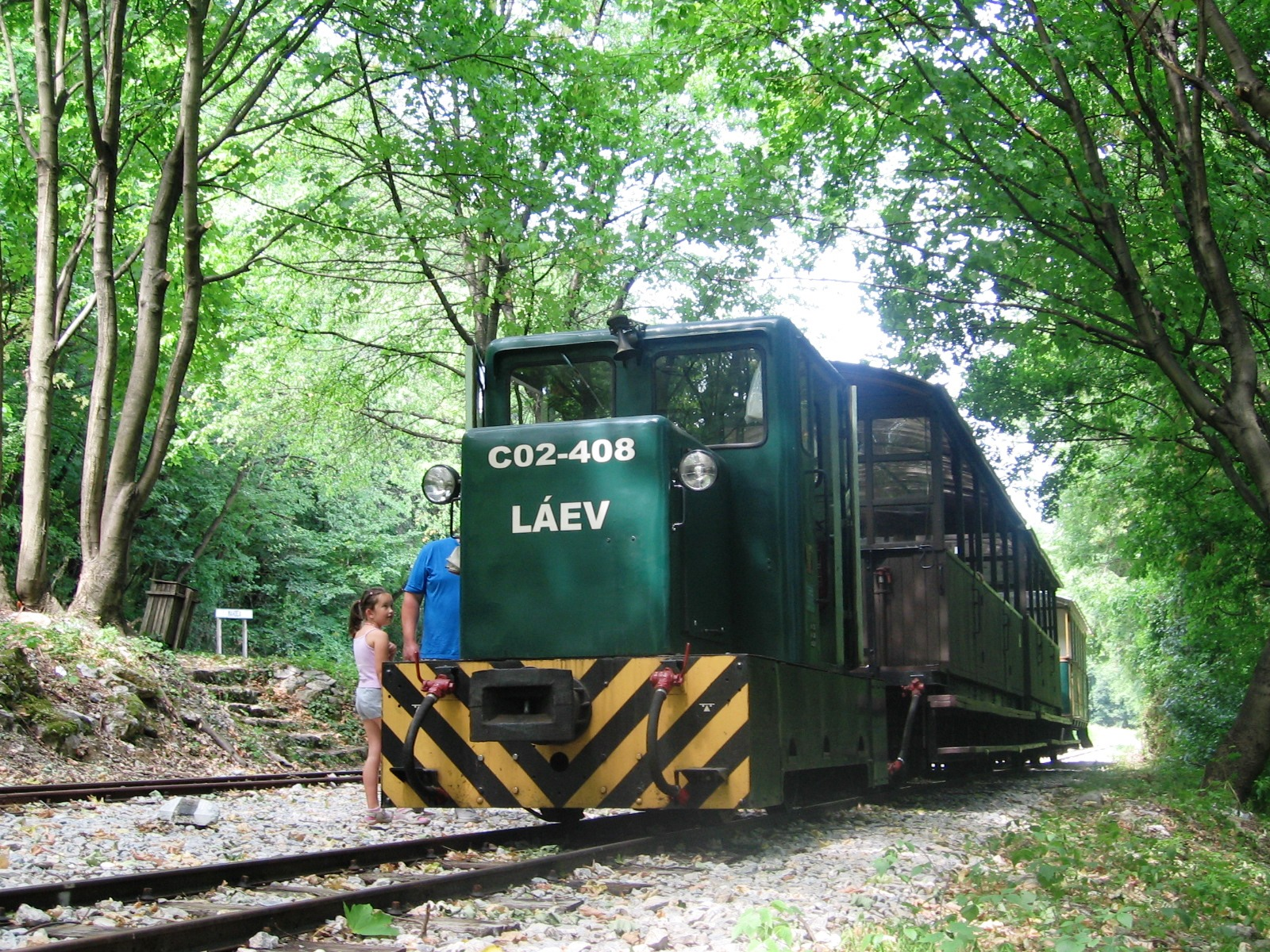 2015, Mahóca, LÁEV